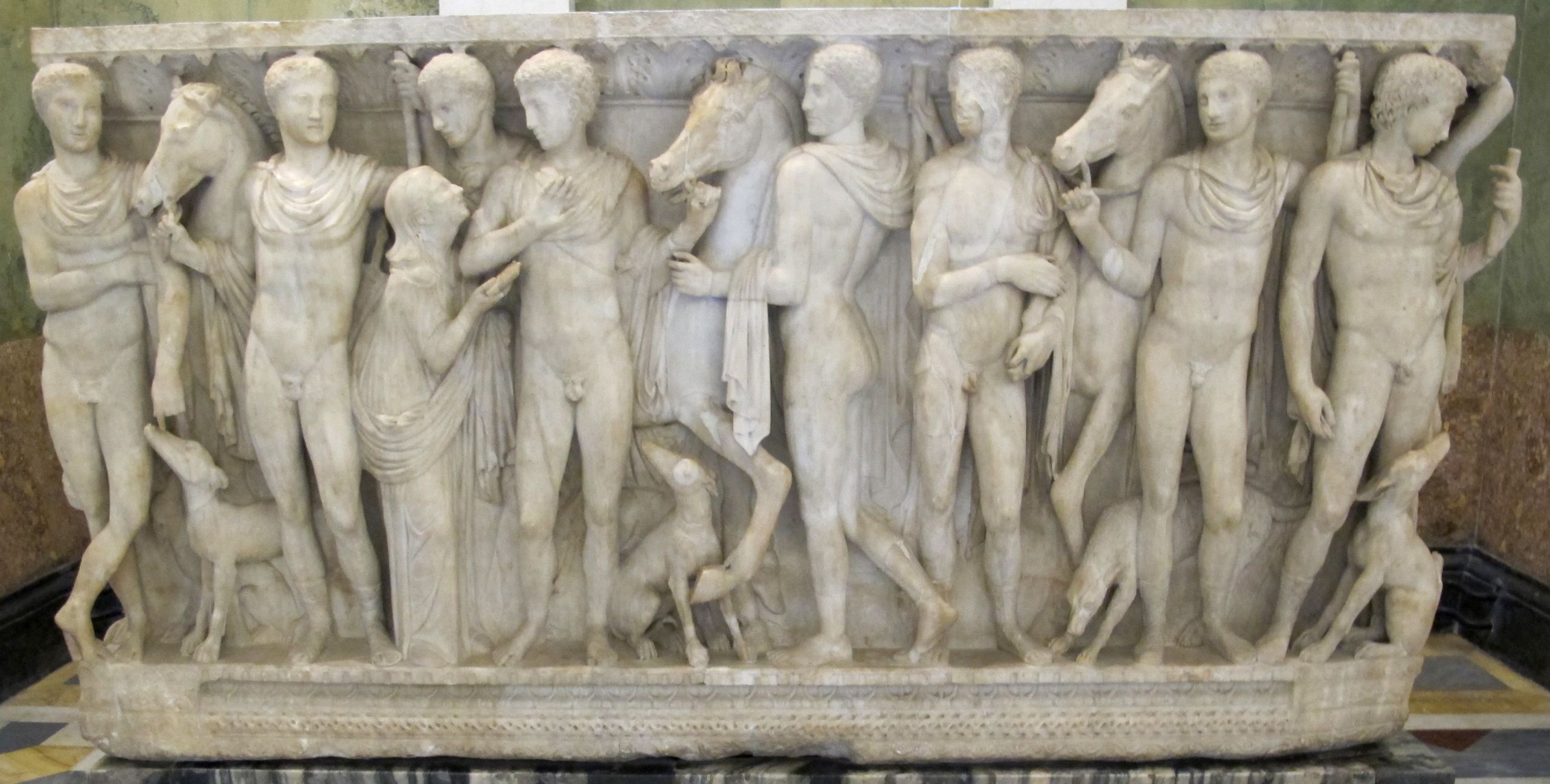 Sarcofago con corteo, III sec.